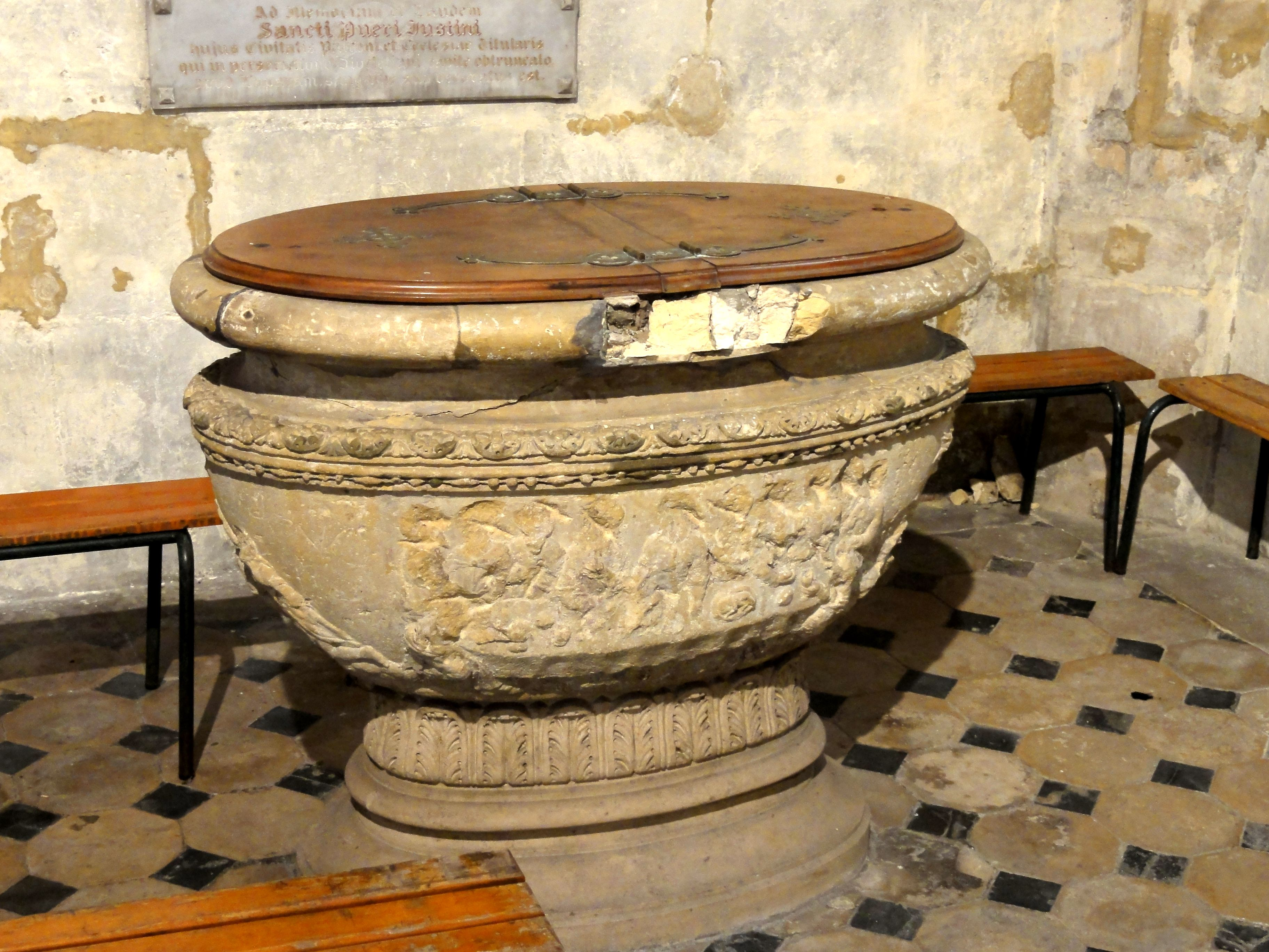 Fonts baptismaux.